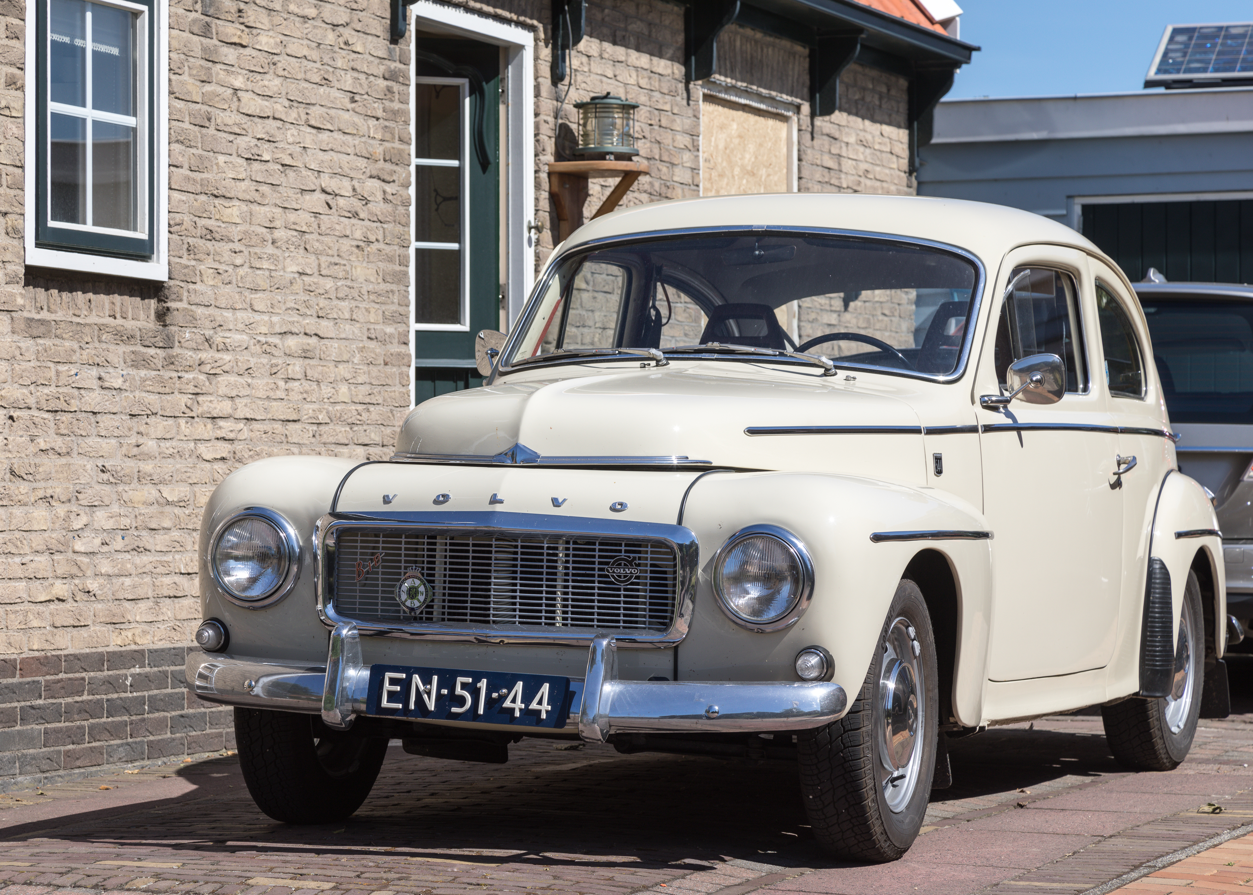 "Buckel-" Volvo PV 544 in Noord-Holland